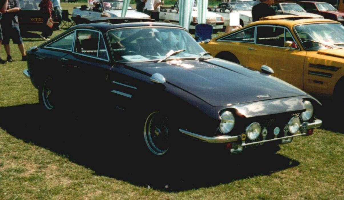 Trident 1970